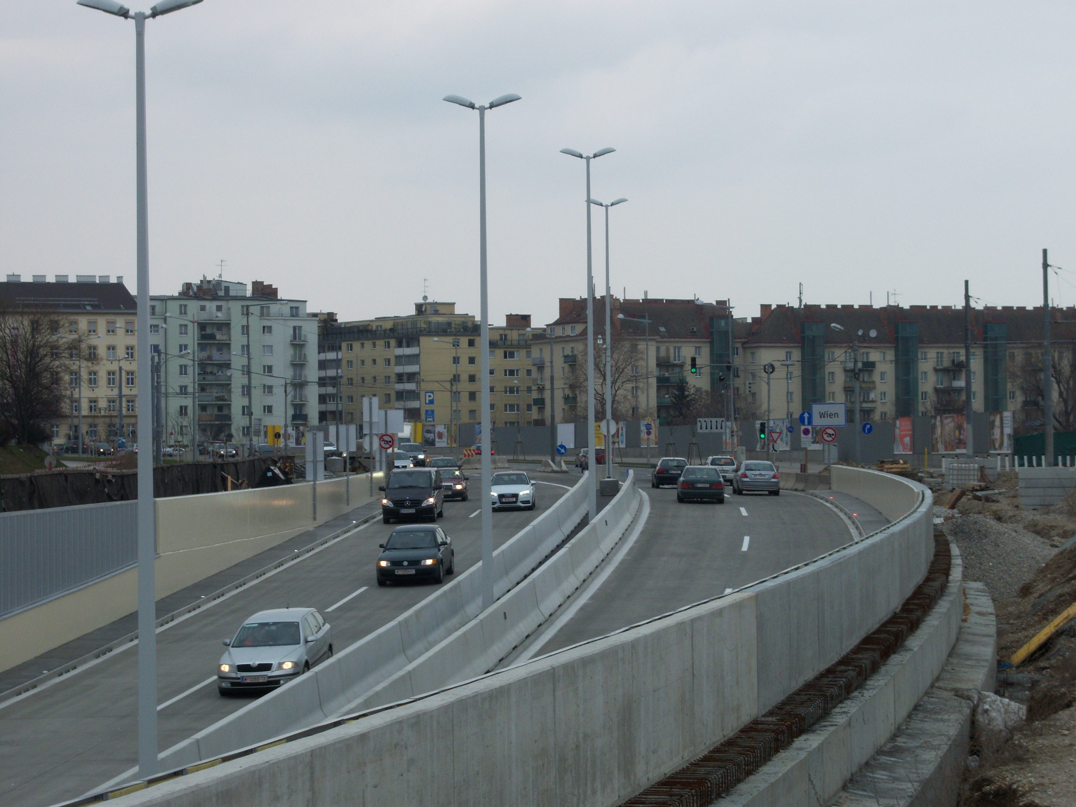 Unterführung "Eurogate" verbindet den Landstraßer Gürtel und die Autobahn Südosttangente Wien A23